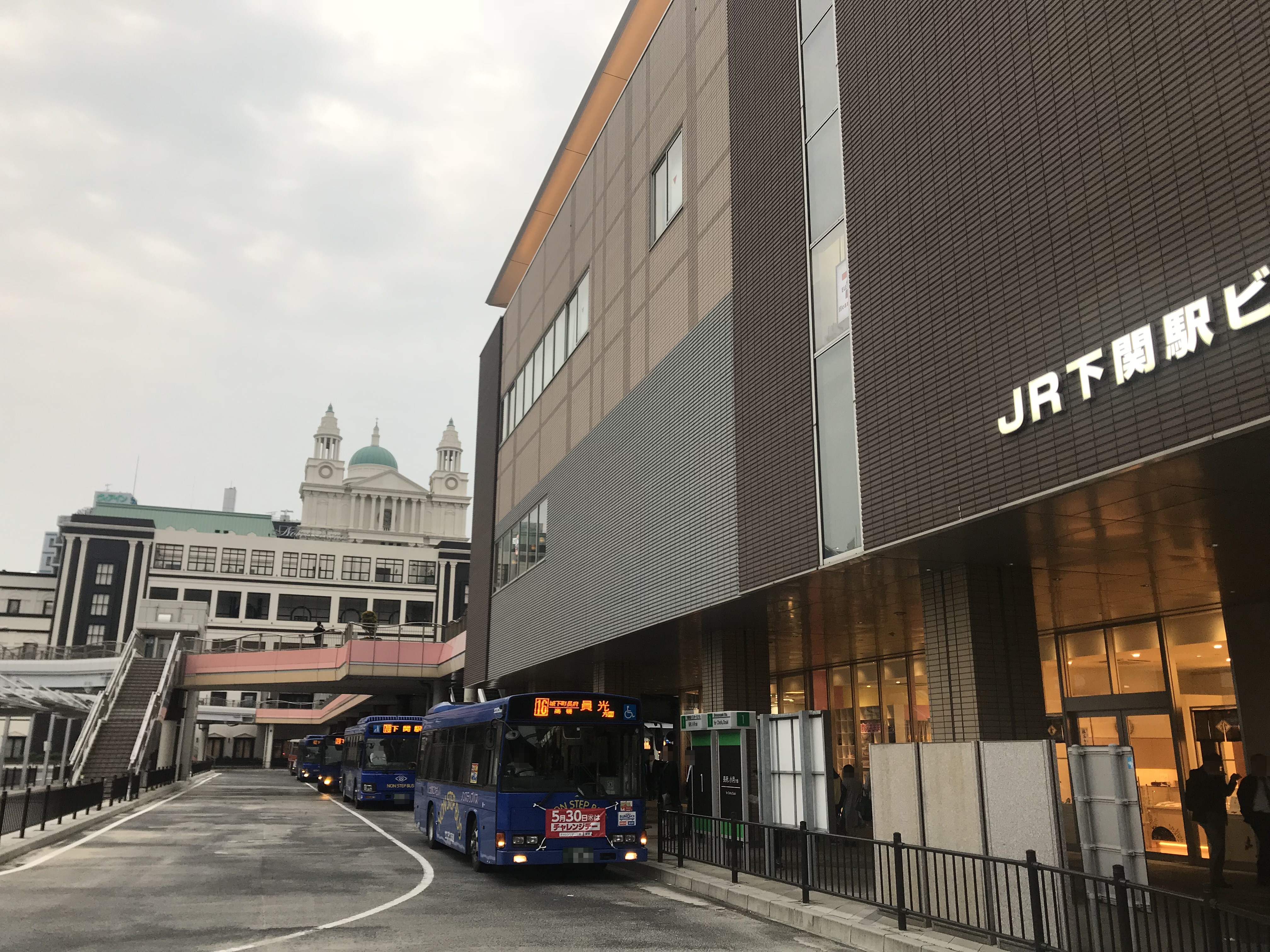 下関駅東口の駅前風景